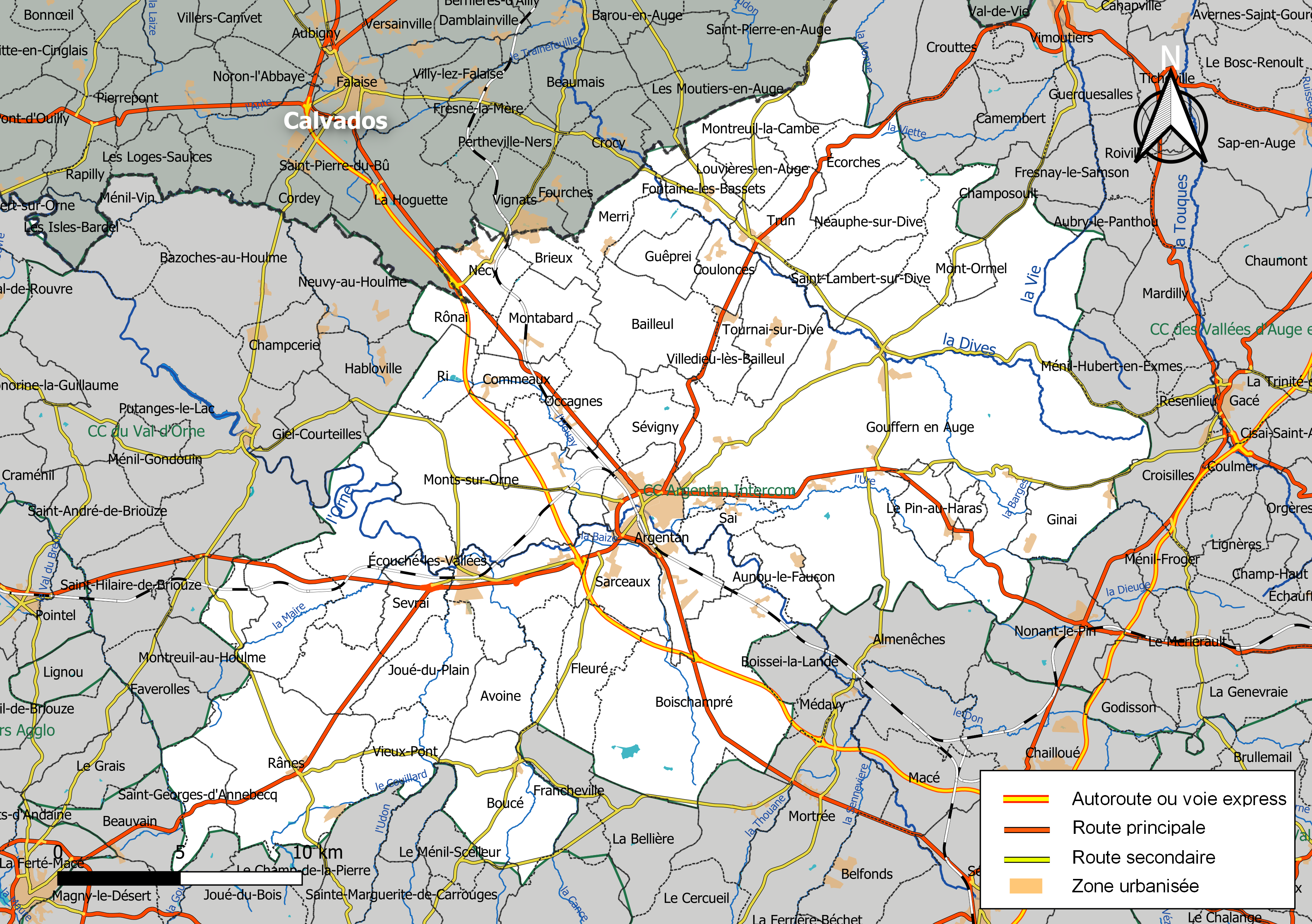 Carte géographique de la Communauté de communes Argentan Intercom, département de l'Orne, France. Composition au 1er janvier 2019.